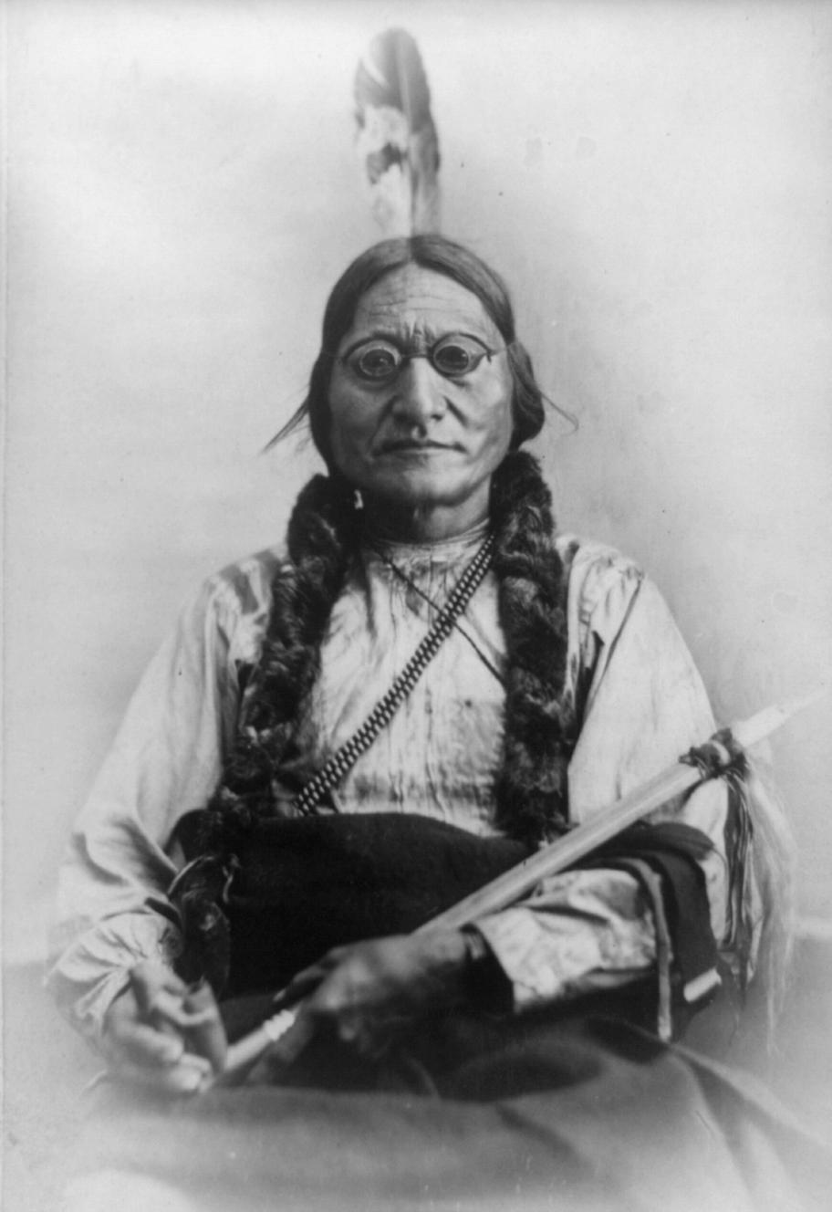 Sitting Bull